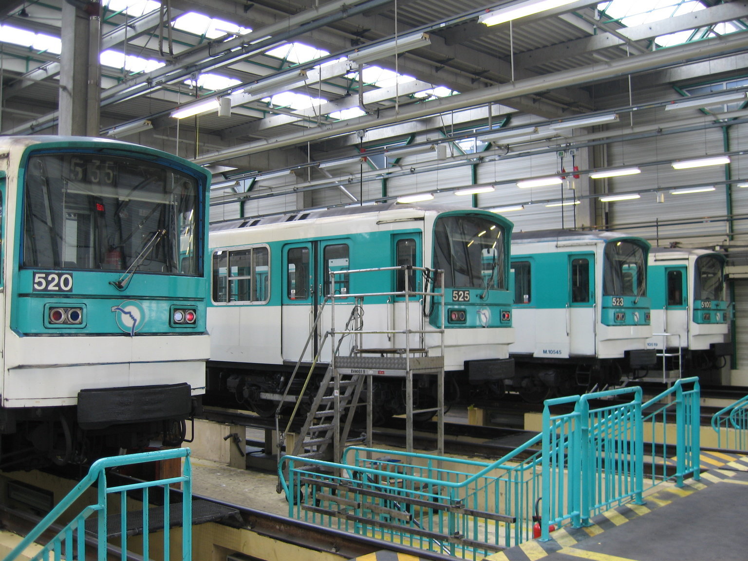 MF 67 en fosses à l'atelier de Bobigny, lignes T1 et M5. JPO Atelier de Bobigny 24/05/2008.